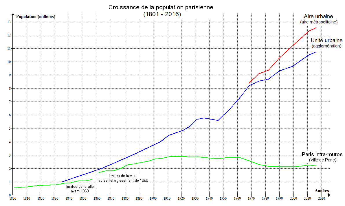 Graphique créé par moi-même avec Graph 4.1. Sources: INSEE et divers travaux d'historiens.